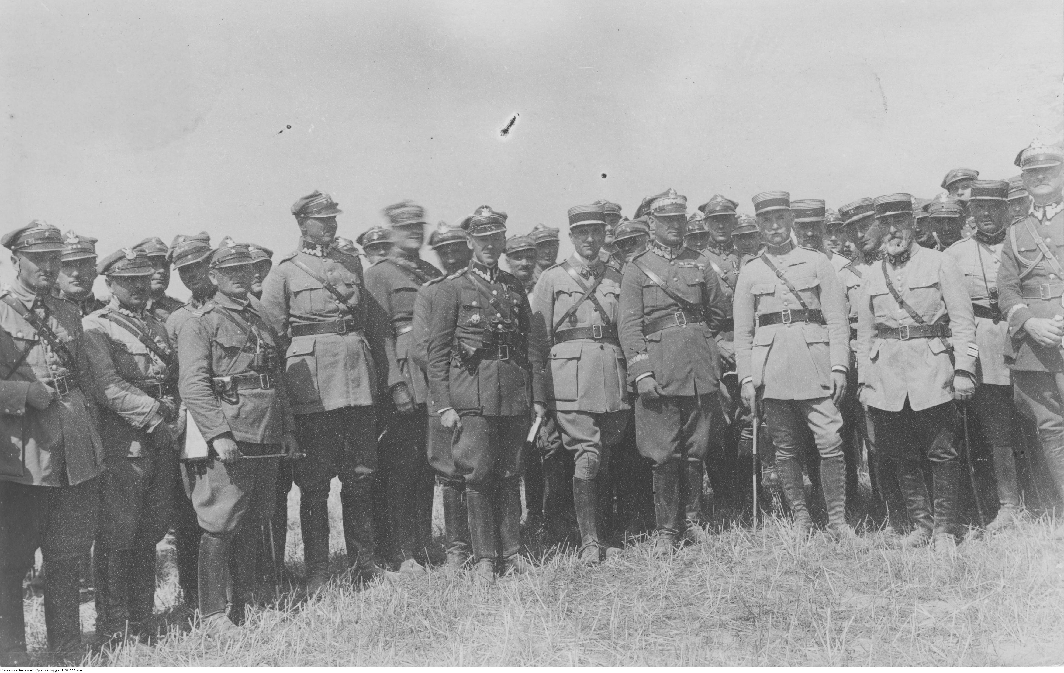 Ćwiczenia 23 Górnośląskiej Dywizji Piechoty dla Wyższej Szkoły Wojennej. Fotografia grupowa uczestników ćwiczeń. Widoczny m.in. gen. Józef Zając (4. z prawej w 1. rzędzie). Koncern Ilustrowany Kurier Codzienny - Archiwum Ilustracji. Sygnatura: 1-W-1152-4